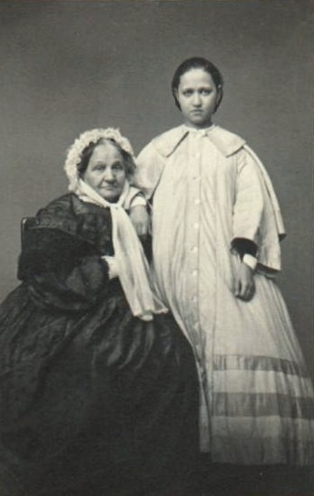 Вера Николаевна Воейкова, ур. Львова (1792—1872) с внучкой Ольгой.